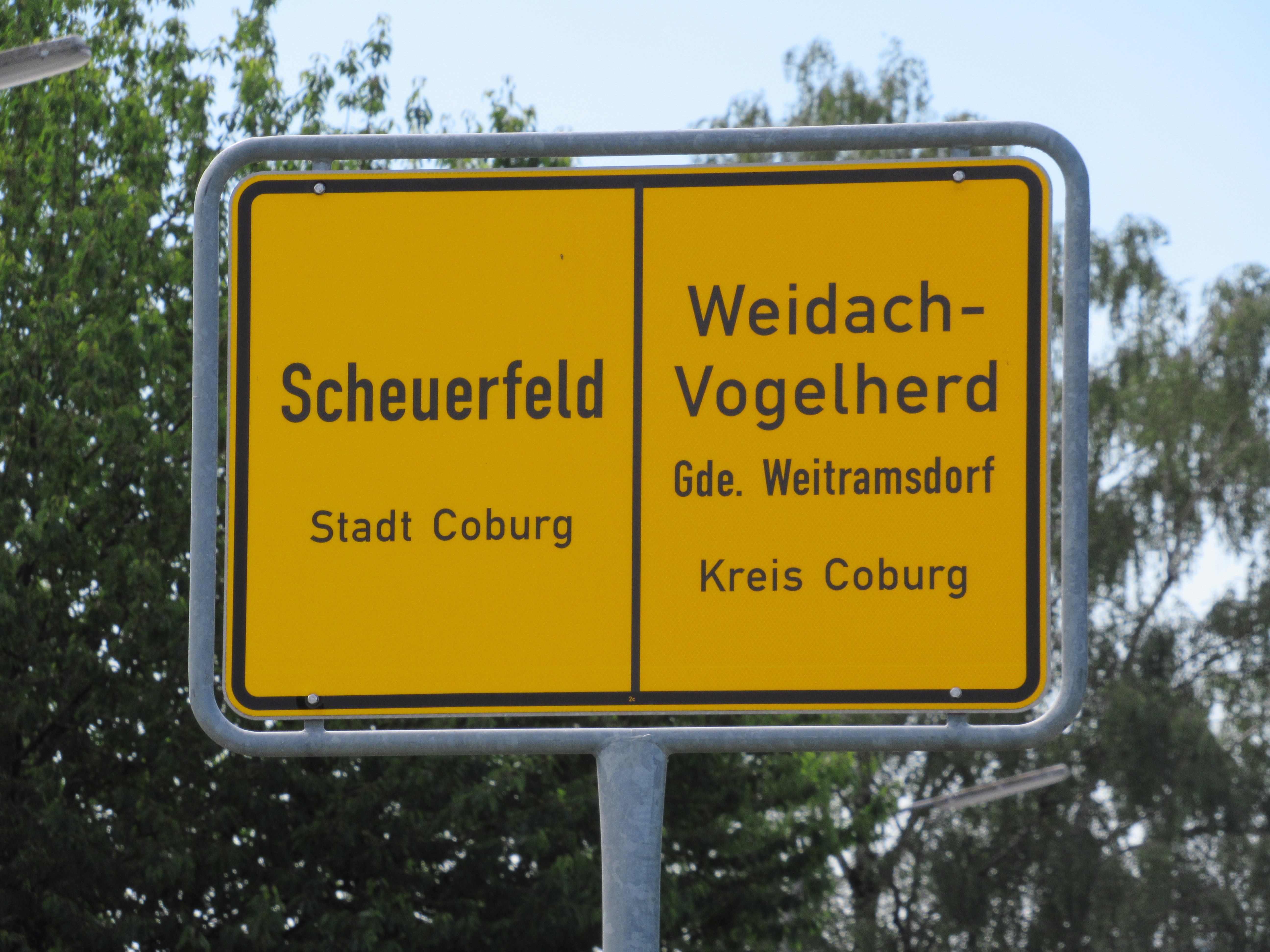 Gemeinsames Ortsschild von Scheuerfeld und Weidach-Vogelherd an der bayerischen Staatsstraße 2202